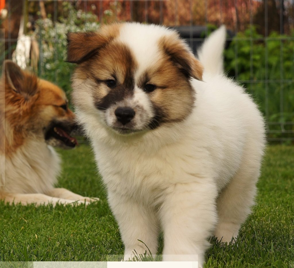 Szczenię psa islandzkiego (Polska)